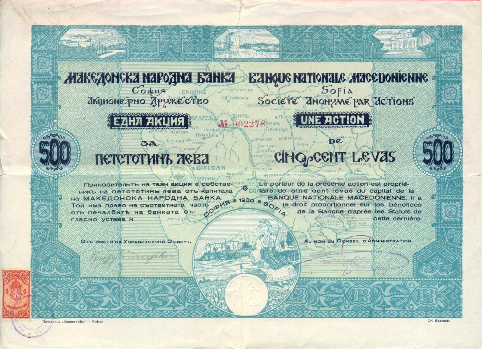 Акция на Македонската народна банка.